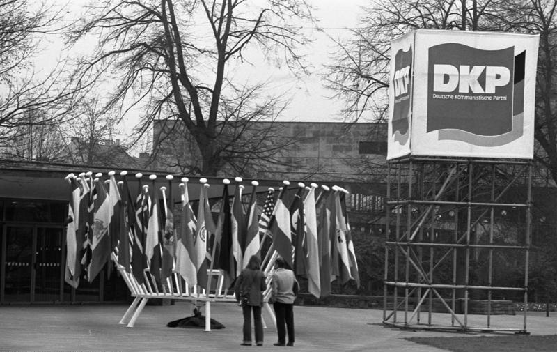 DKP-Parteitag in der Beethovenhalle, Bonn (Deutsche Kommunistische Partei)